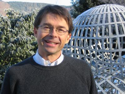 Michael Struwe 2006 in Oberwolfach